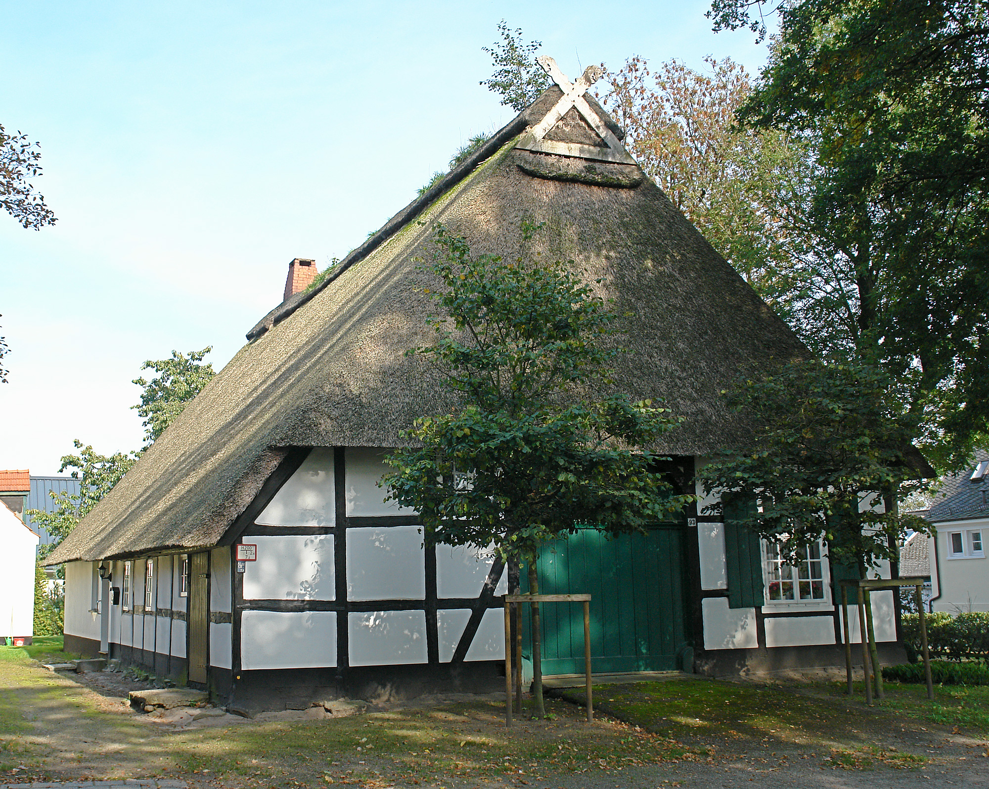 Haus Schumacher in Bremen, Oberneulander Landstraße 93.Das abgebildete Objekt ist ein geschütztes Kulturdenkmal in der Freien Hansestadt Bremen, mit der Nr. 0949 beim Landesamt für Denkmalpflege registriert.